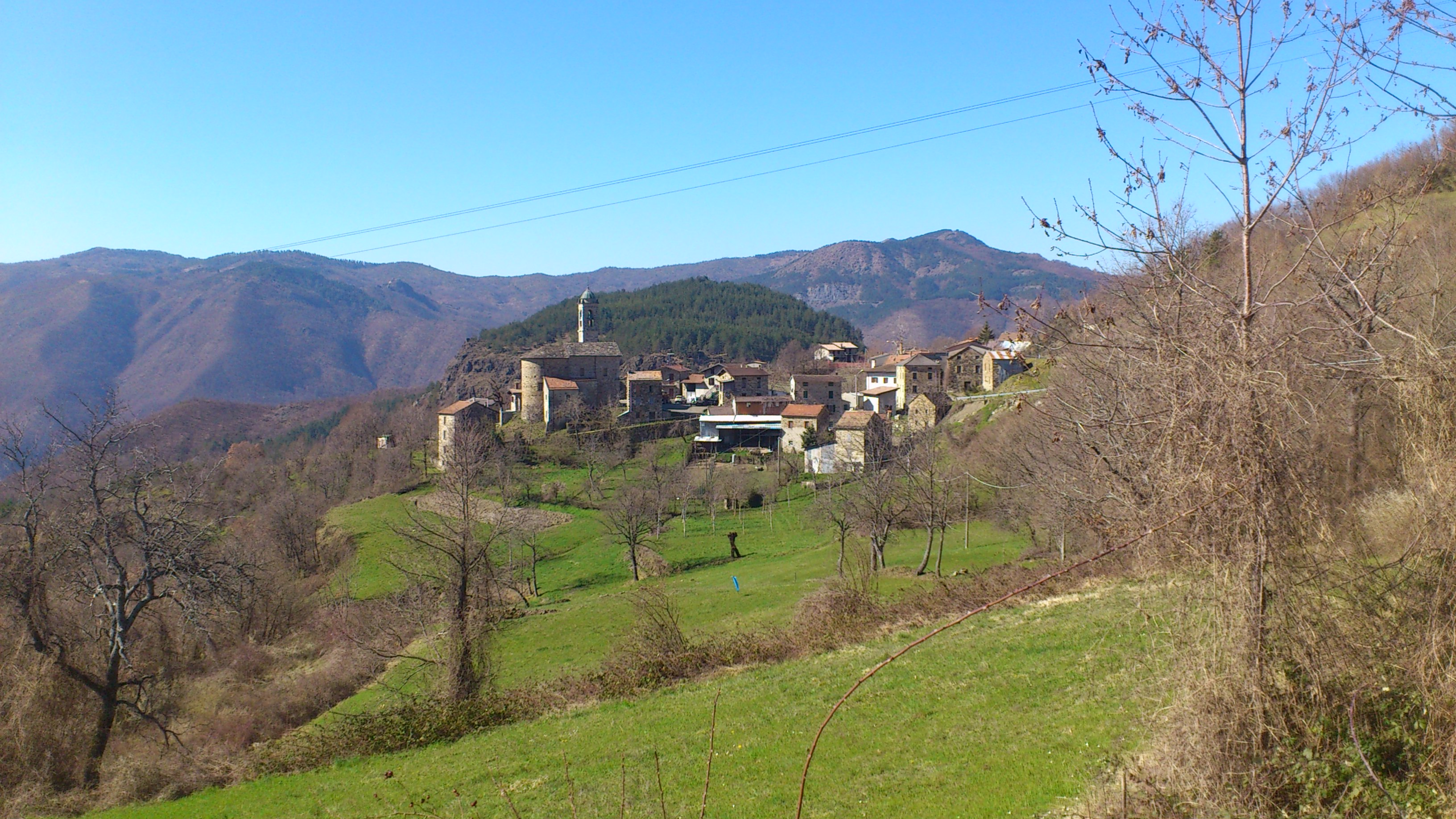 Veduta di Castelcanafurone e monte Gratra